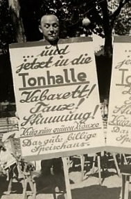 Reklame für die „Tonhalle“ in Gera, in dessen gastronomischen Einrichtungen wie dem „Krug zum grünen Kranze“ der Inhaber Alex Braune seit 1926 ein vielfältiges Unterhaltungsprogramm bot.